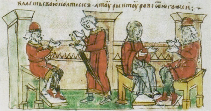 Беларуская (тарашкевіца): Мініятура Радзівілаўскага летапісу: сваты наўгародзкага князя Ўладзімера ў Рагвалода (леваруч); Рагвалод гутарыць з Рагнедай, якая адмовілася выйсьці замуж за Ўладзімера (праваруч)